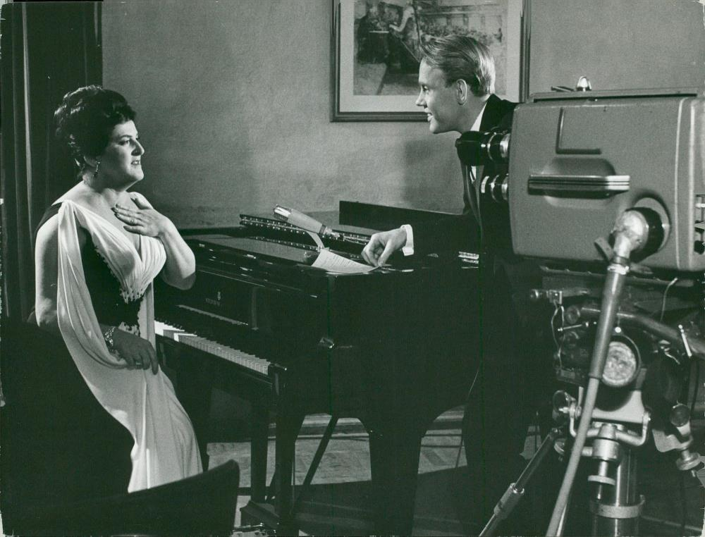 Birgit Nilsson intervjuas av TV:s Lennart Swahn.